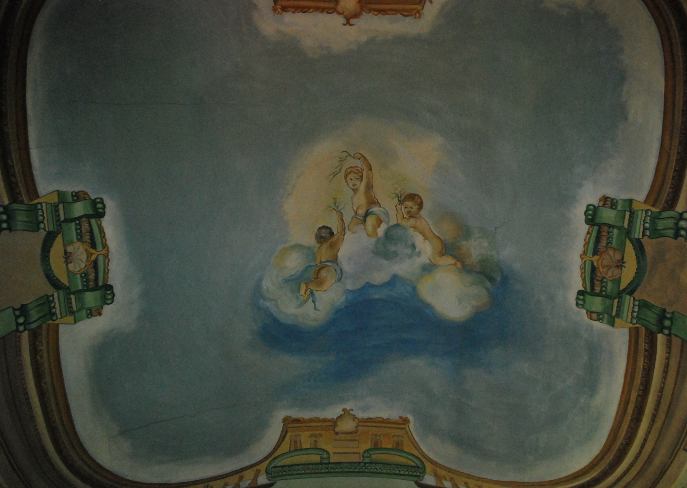 Affrescosulla volta della chiesa di San Rocco a Maccagno con Pino e Veddasca VA